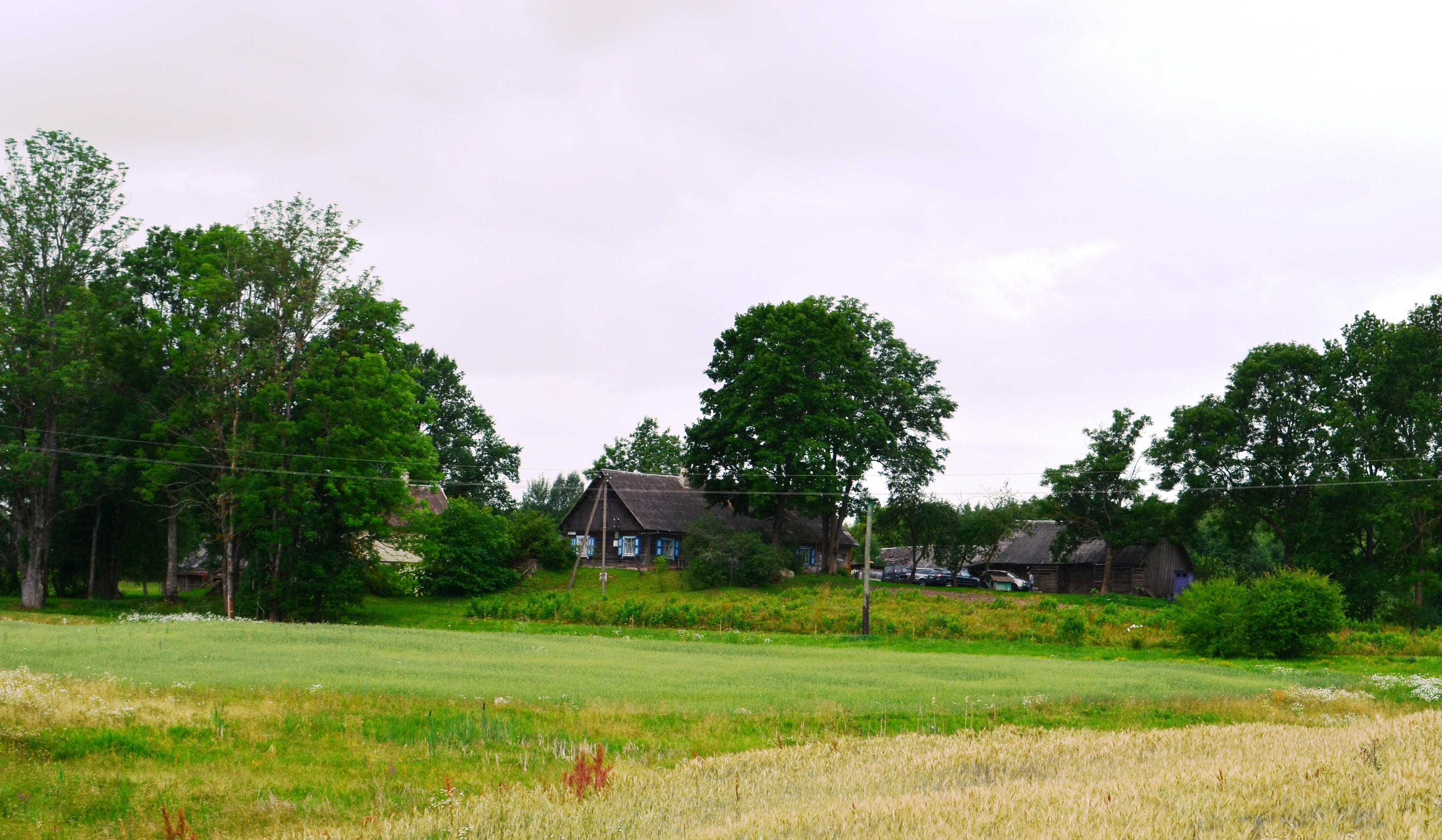 Petručai/Petručiai, Vilniaus r.